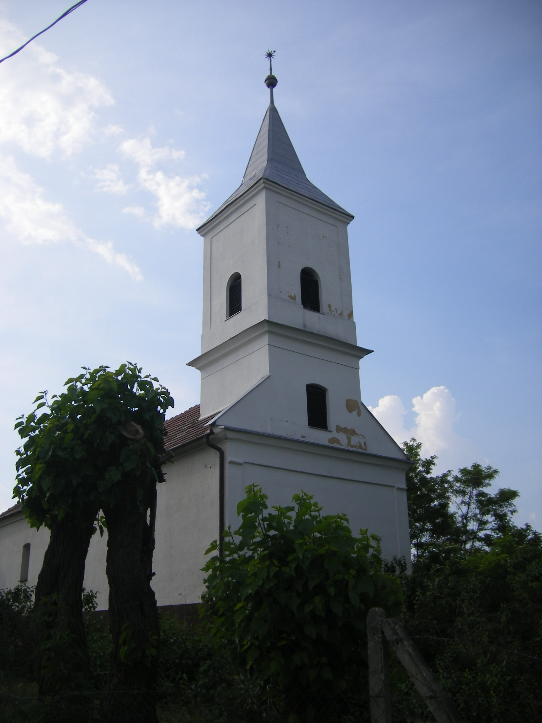 Csúz - református templom